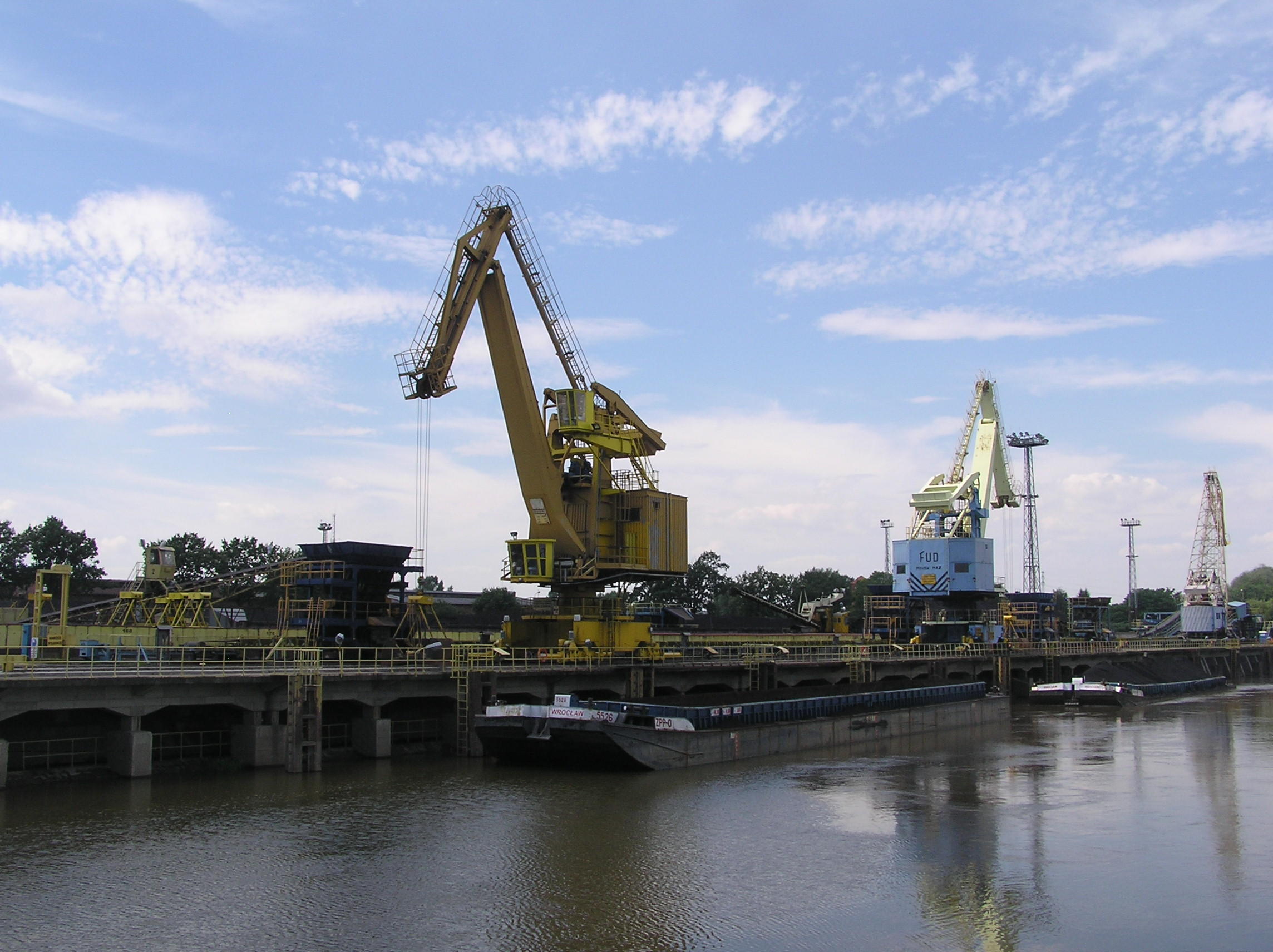 Wrocław, Kleczków, Odra - Kanał Miejski/Stara Odra, Przeładownia Elektrociepłowni Wrocław